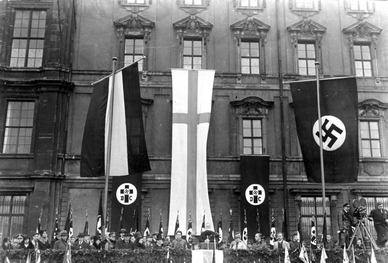 Die große Feier des Luthertages im Lustgarten in Berlin! Bischof Hossenfelder hält die Ansprache auf der Rampe des Berliner Schlosses im Lustgarten. 19.11.1933